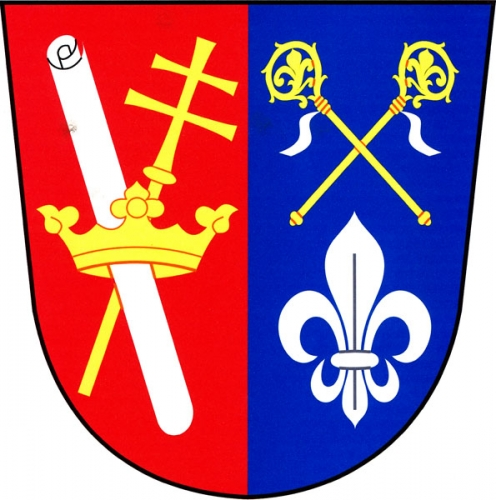 Znak, ,Olšany okres Šumperk